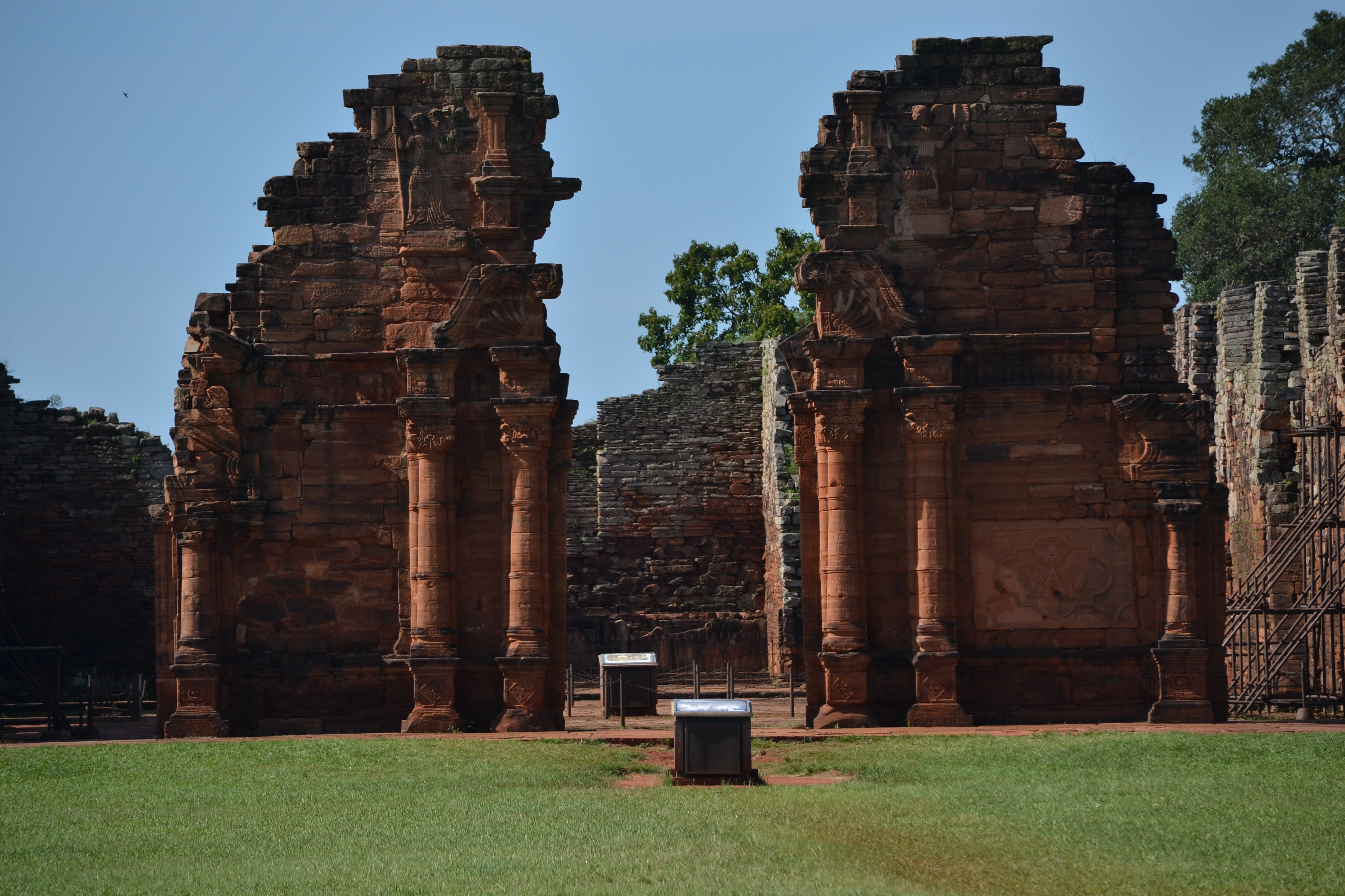 Misiones Jesuíticas Guaraníes San Ignacio Miní